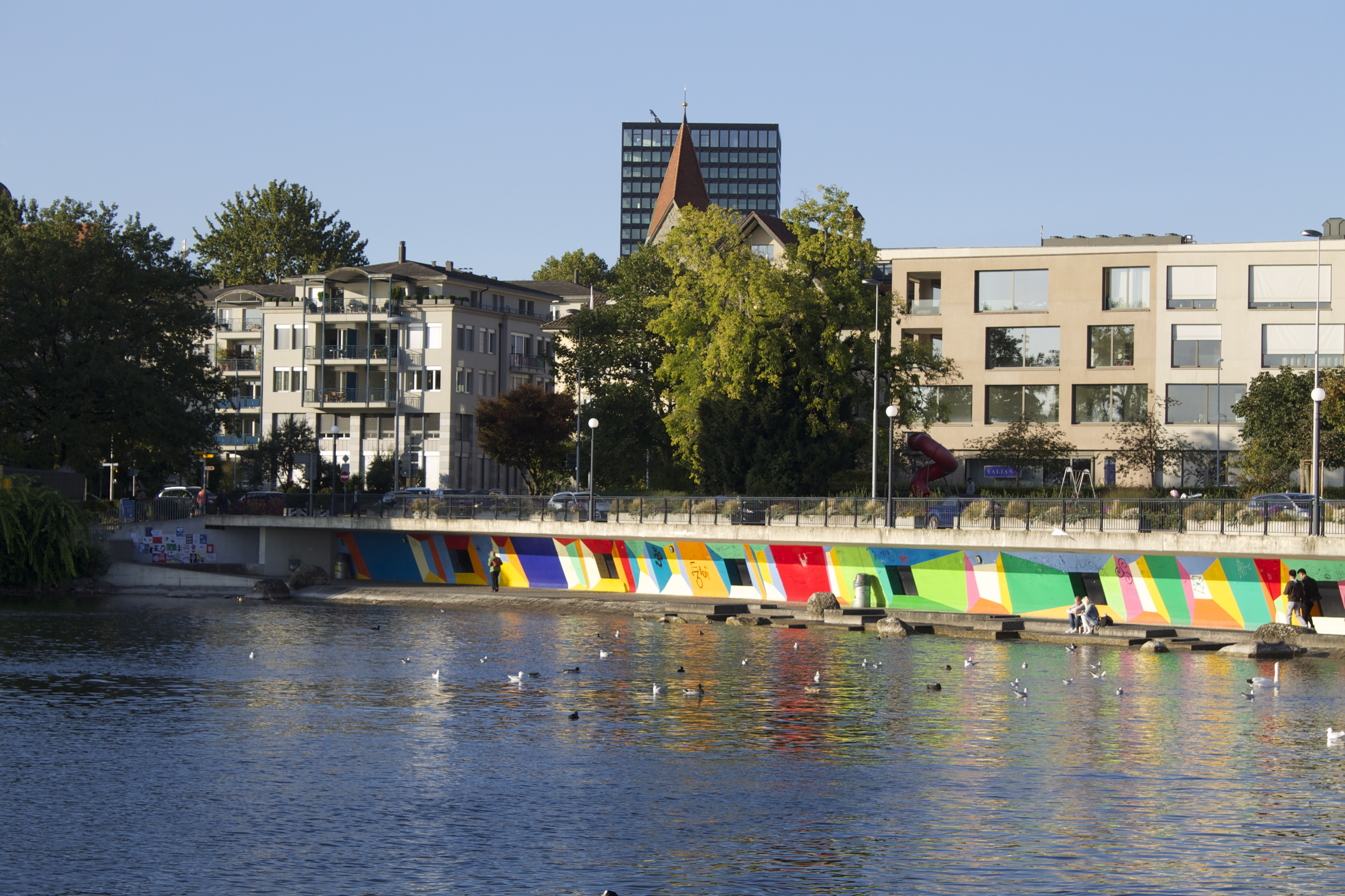 Zug